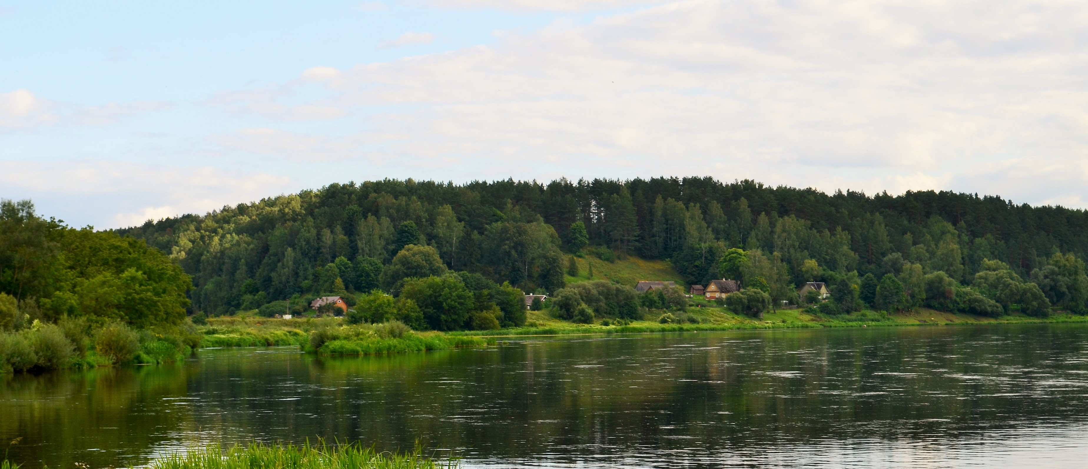 Česukai žvelgiant nuo Merkinės, Varėnos raj.